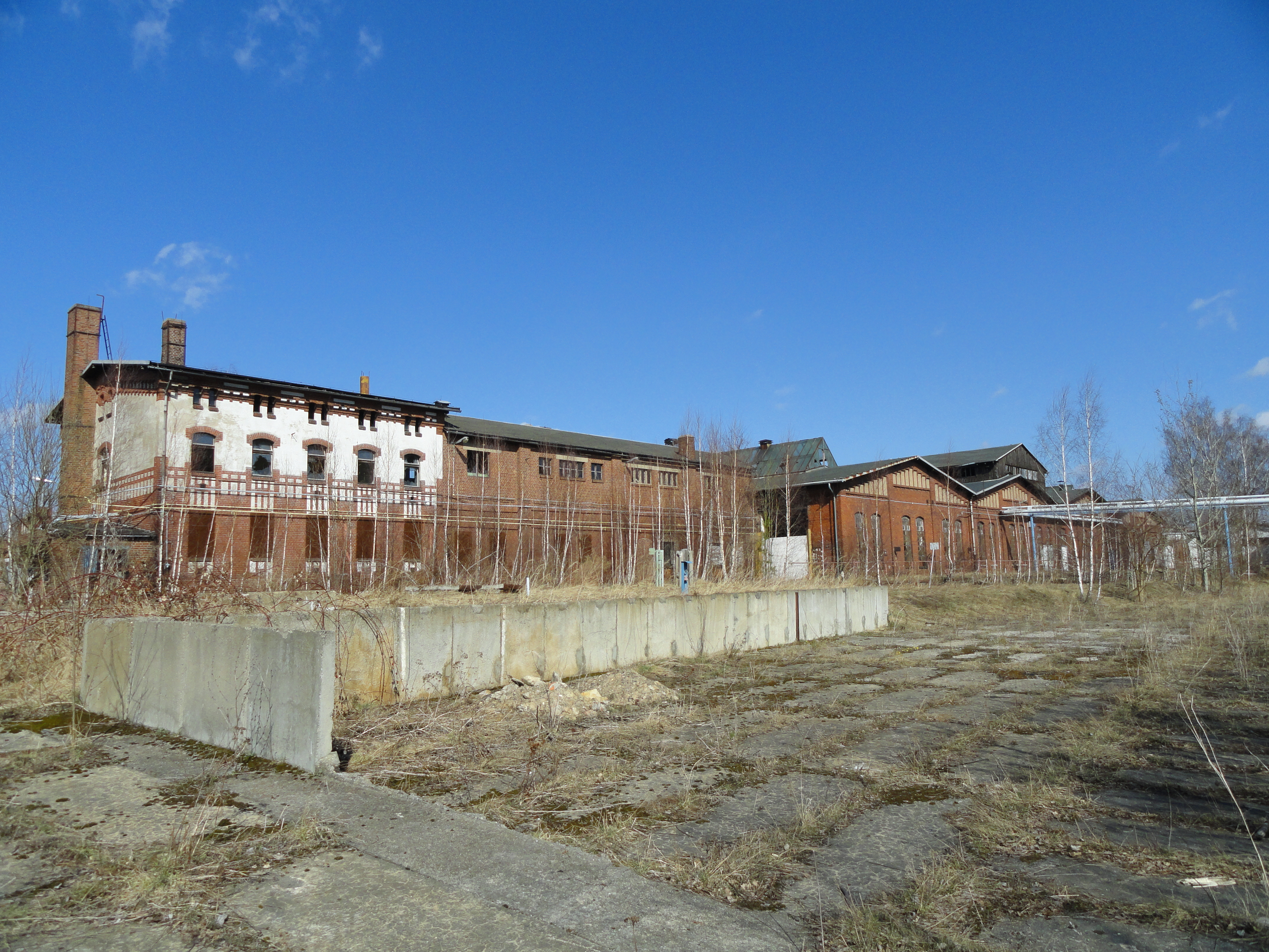 verfallende Hallen des ehemaligen Reichsbahnausbesserungswerkes Schlauroth bei Görlitz